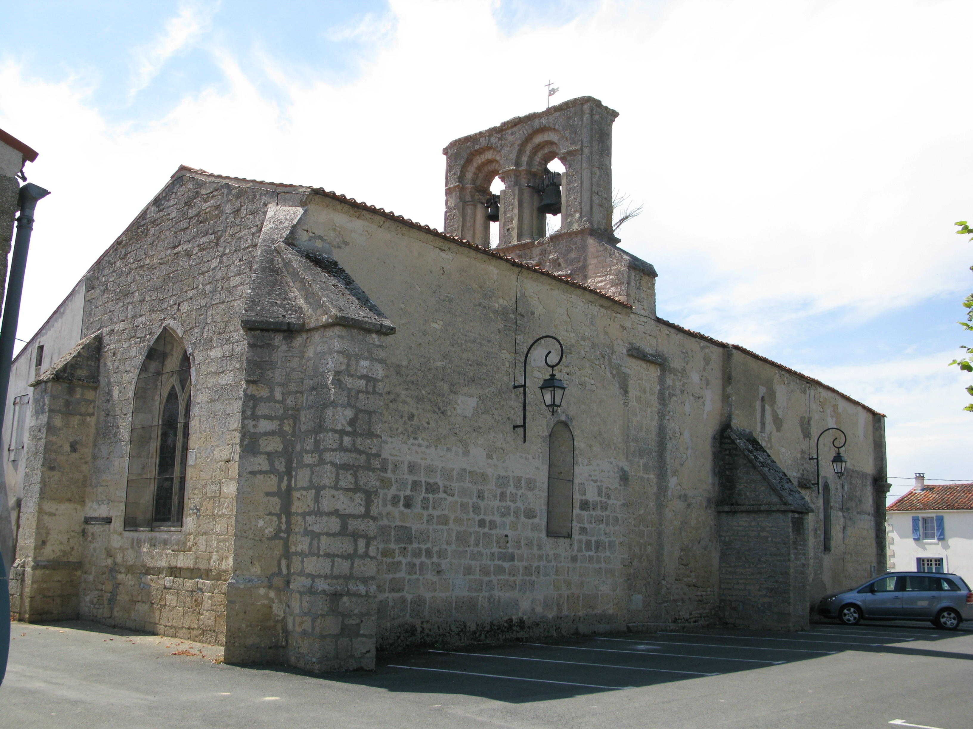 église de Saint-Mard